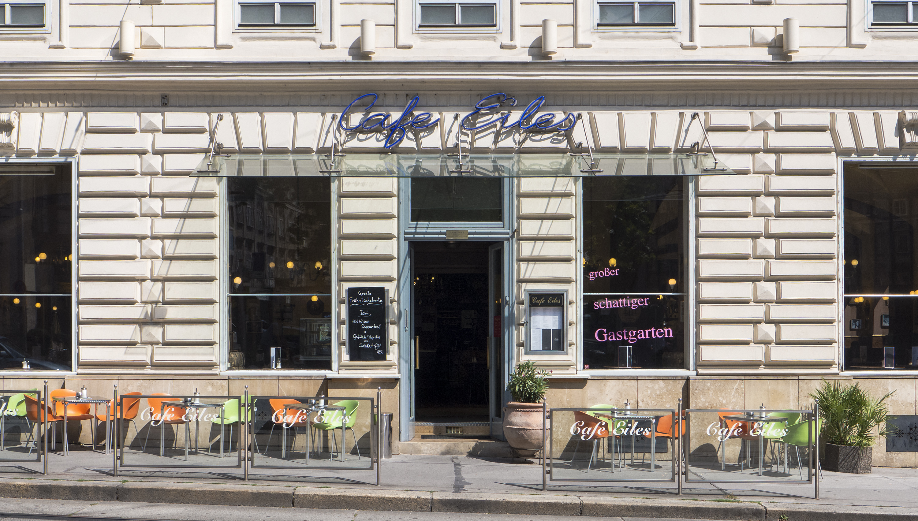 Café Eiles in Wien 8